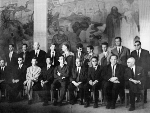 1st algerian government 1962